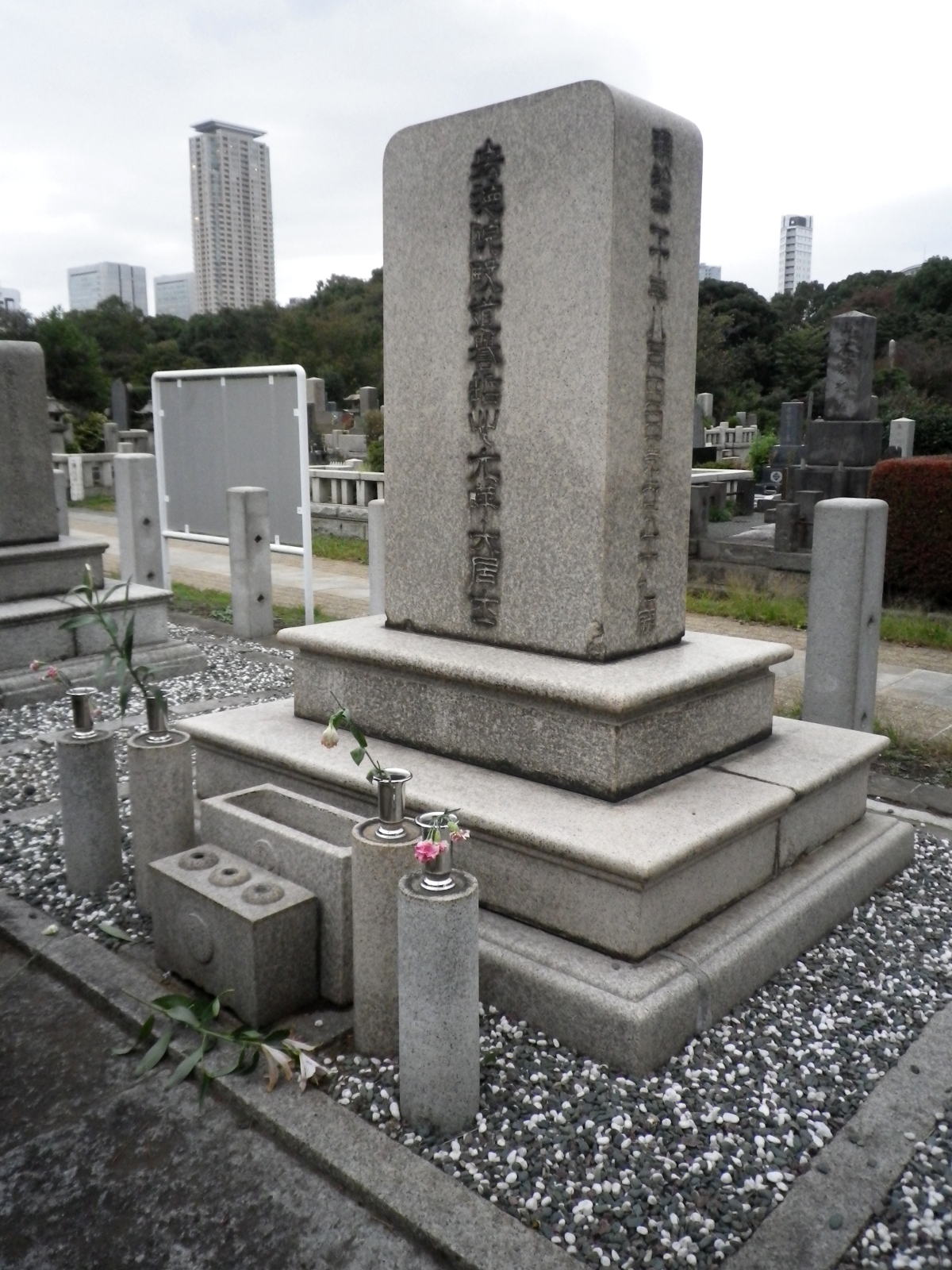 後藤象二郎の墓